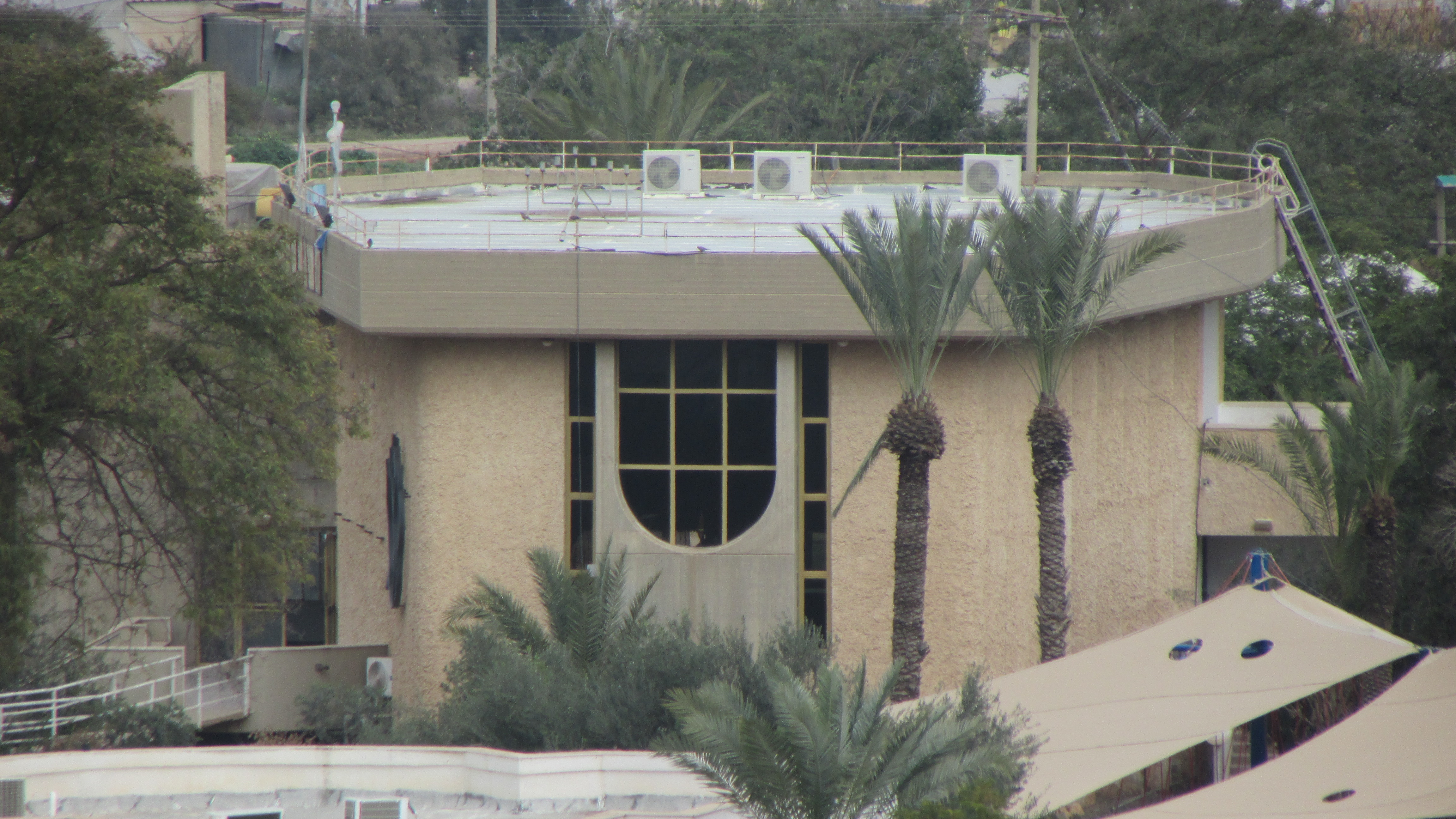 Mehola Synagogue